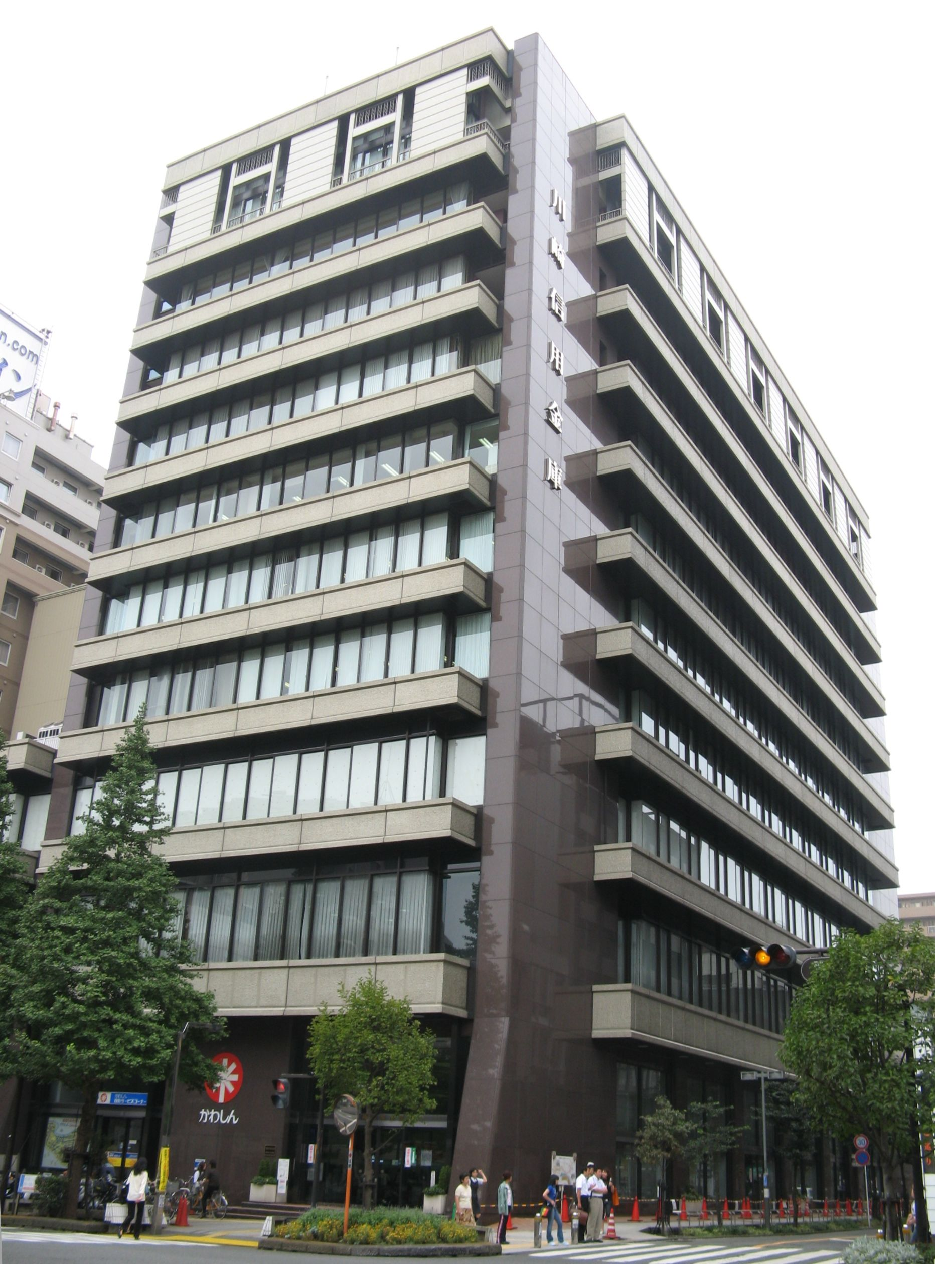 川崎信用金庫本店（川崎市川崎区）